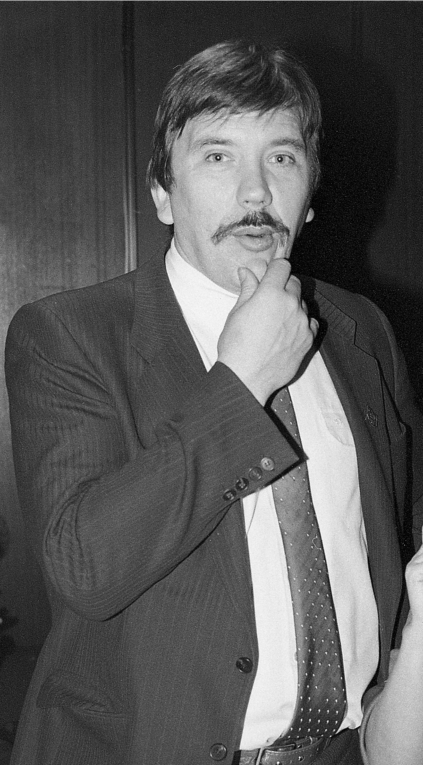 Enno Selirand, usaldustelefoni rajaja ning Hingeabi assotsiatsiooni "Usaldus" president.